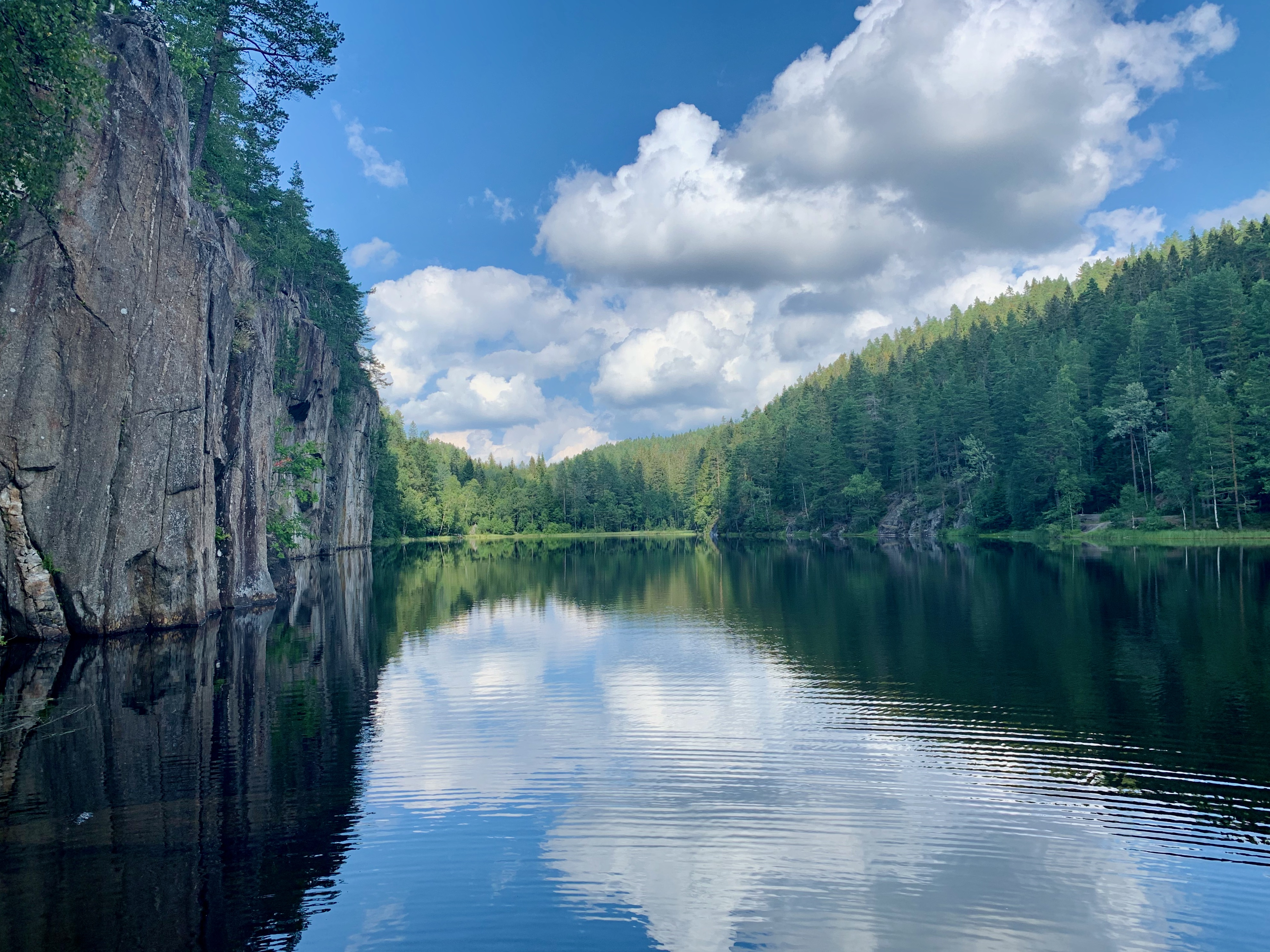 Hauktjern. Østmarka i Oslo.